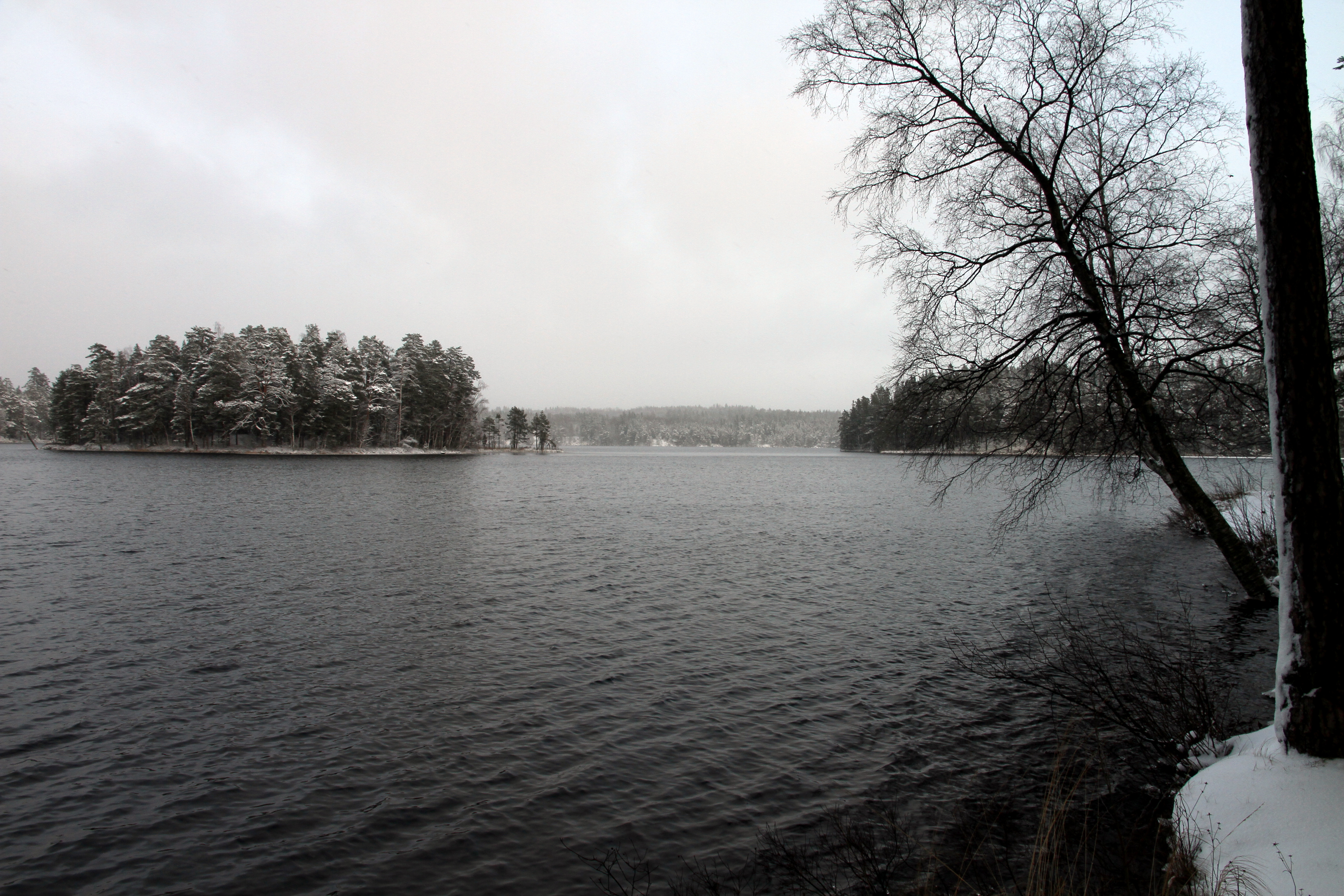 Foto av Björnviken i sjön Östersjön utanför Laxå.